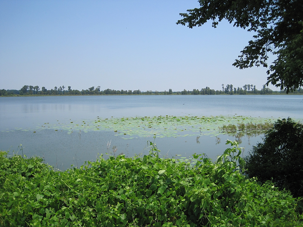 Horseshoe Lake, Arkansas Horseshoe Lake